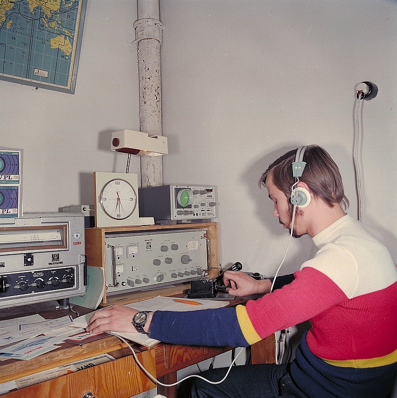 Original image description from the Deutsche FotothekFunkzirkel, Gesellschaft für Sport und Technik (GST). Funker an einem Teltow 215B.